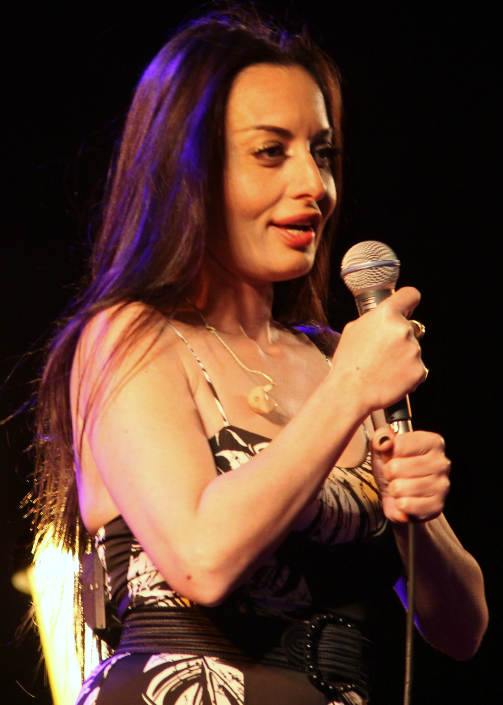 מאיה בוסקילה בהופעה ביום העצמאות 2014 בצפת